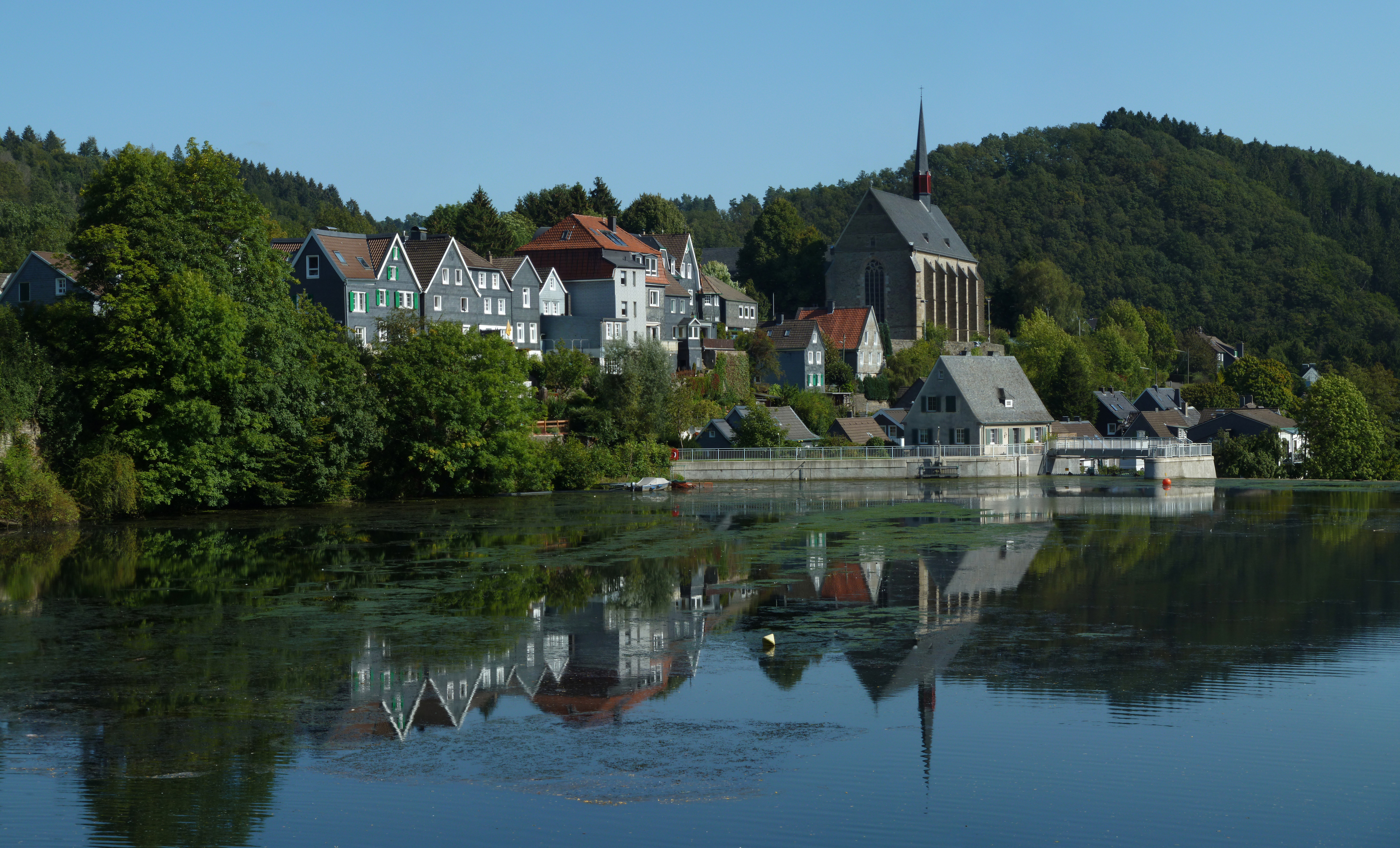 Beyenburger Freiheit und Klosterkirche, WuppertalThis is a photograph of an architectural monument. 238